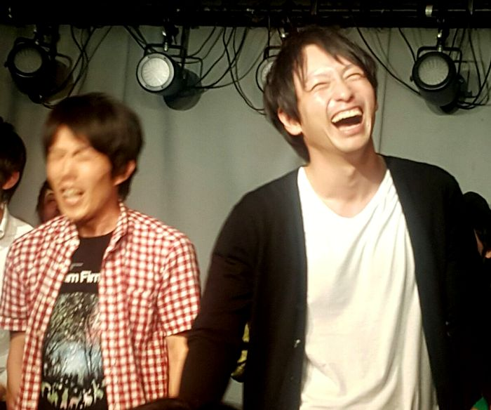 20161016びーちぶ